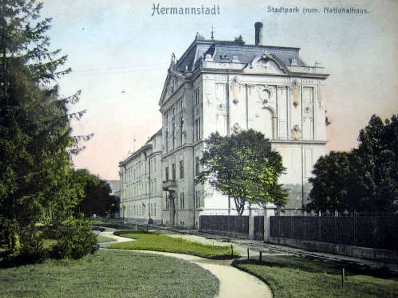 Sibiu, Palatul ASTRA